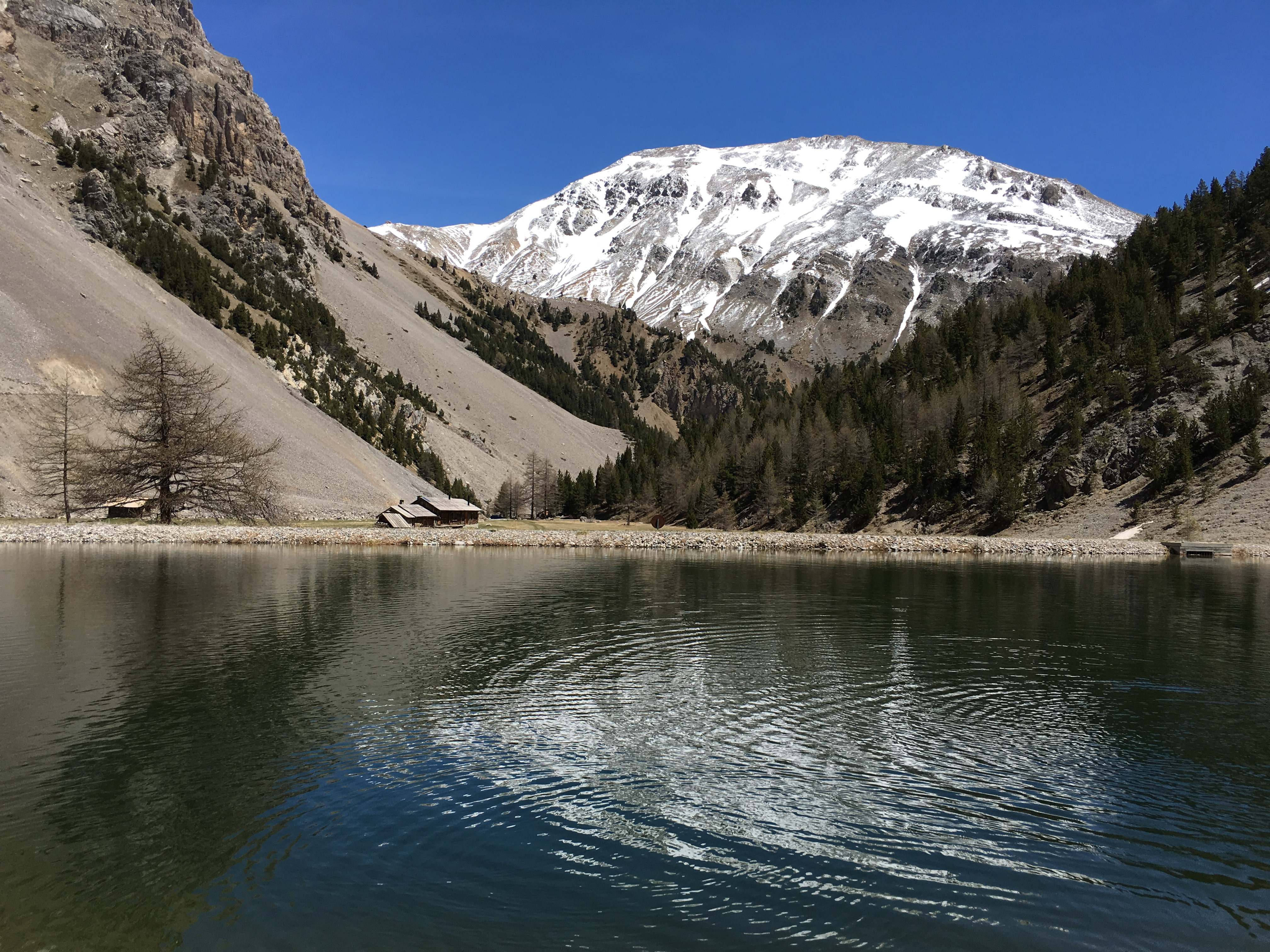 Den Pra Premier im Rücken